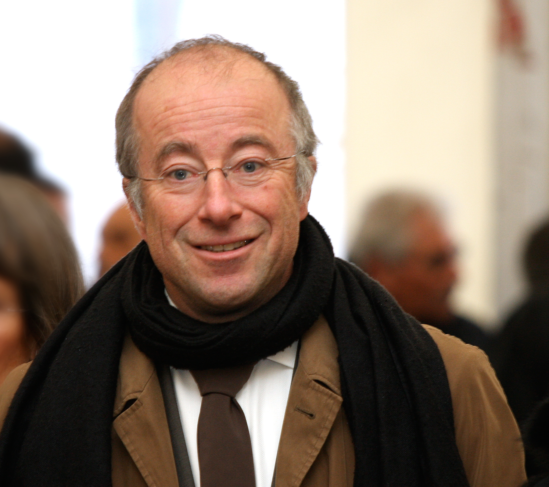 Paul Böhm, Architekt, auf der Grundsteinlegung der von ihm entworfenen neuen Moschee in Köln-Ehrenfeld